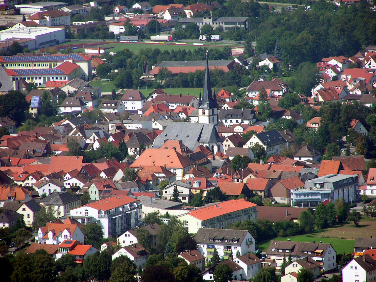 Description: Bad Staffelstein vom Staffelberg aus Source: Selbst fotografiert Date: 4. September 2005 Author: Schubbay